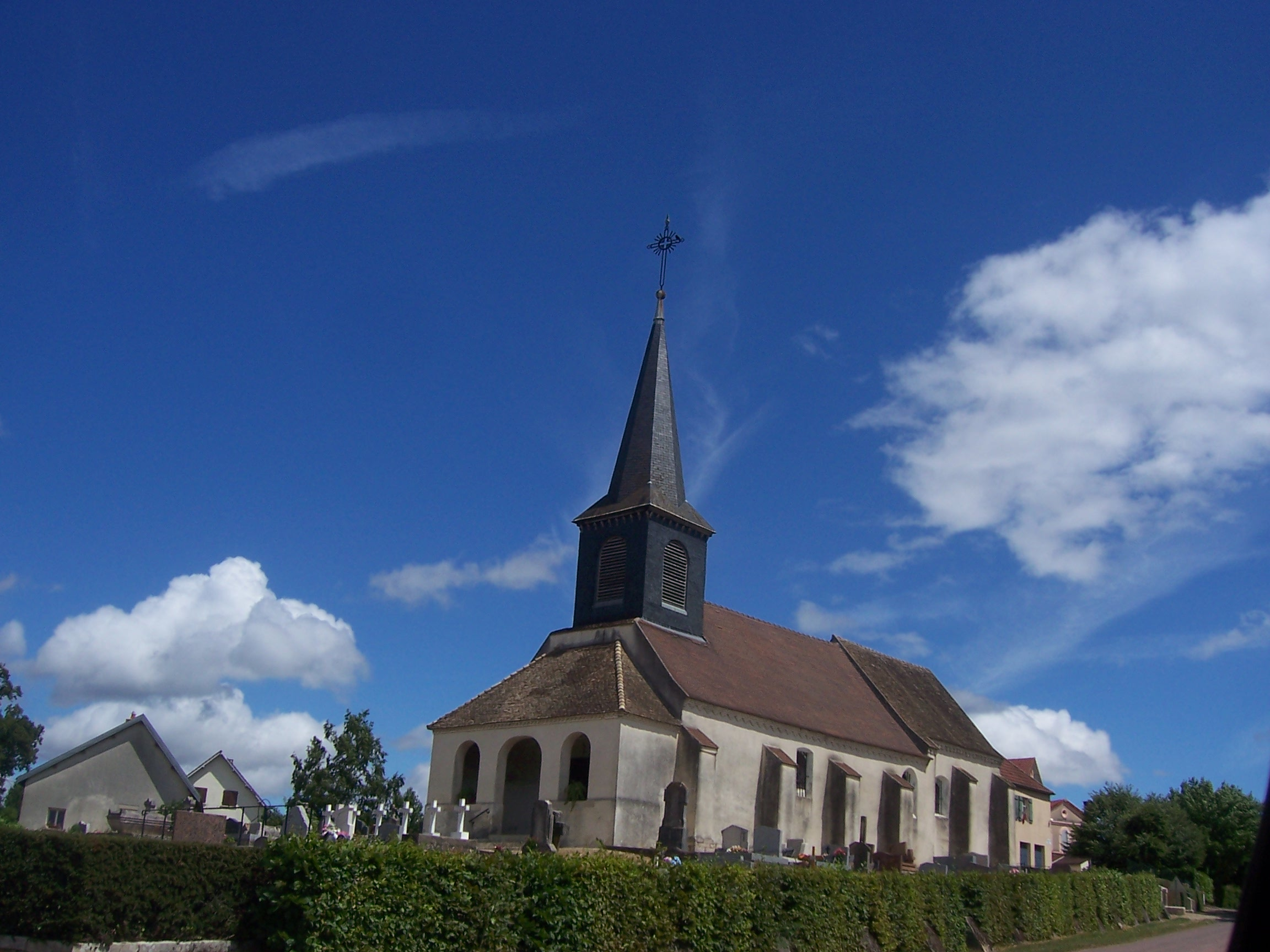 Eglise de La Villeneuve